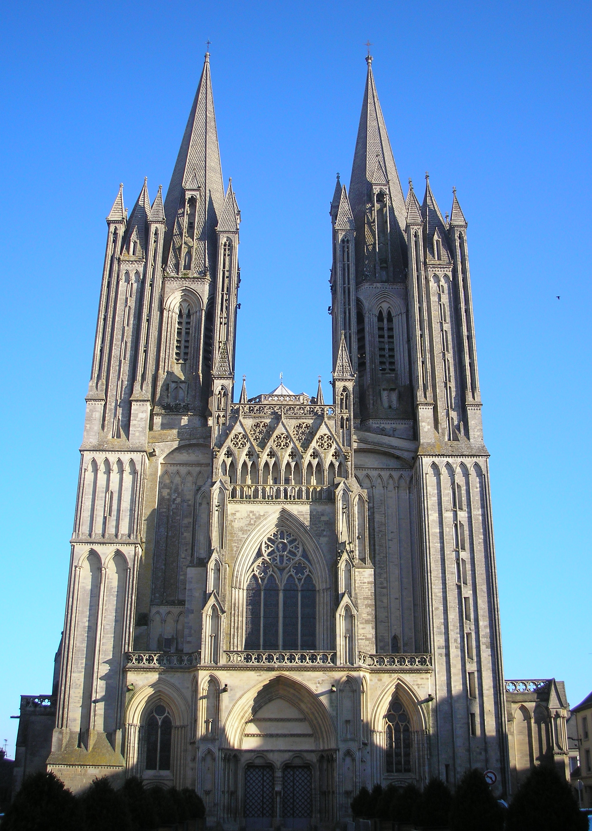 Coutances (Normandie, France). La façade de la cathédrale Notre-Dame.